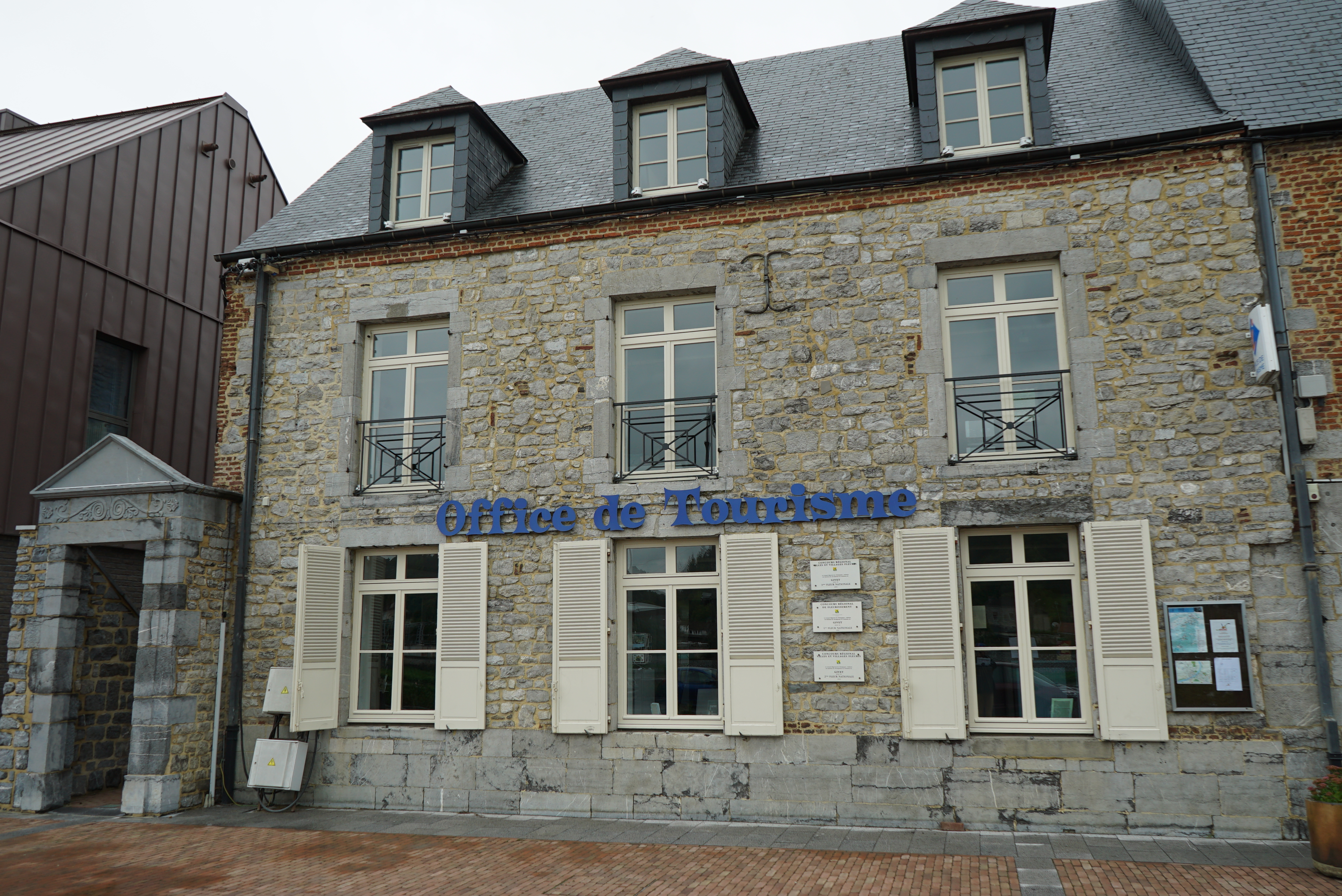 vue de Cf. titre.